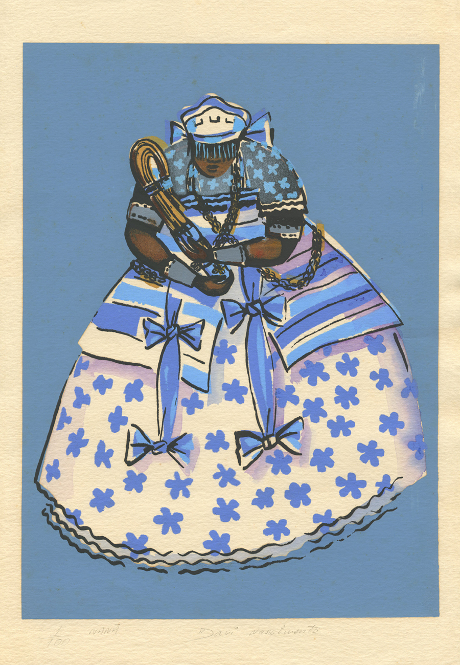 Nanã Buruku or Nana Buluku an Orisha of Candomblé